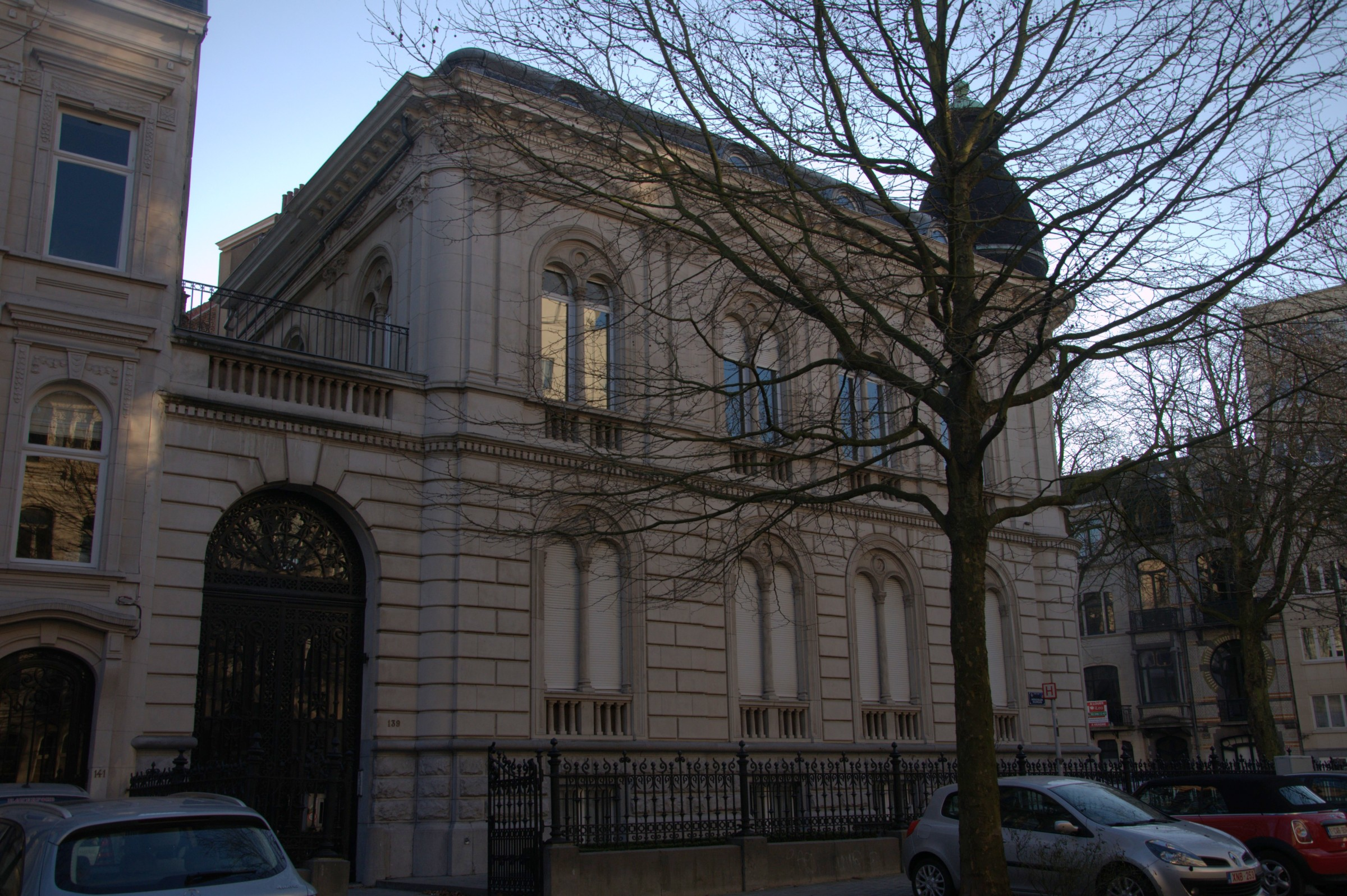 patrimoine immobilier de bruxelles